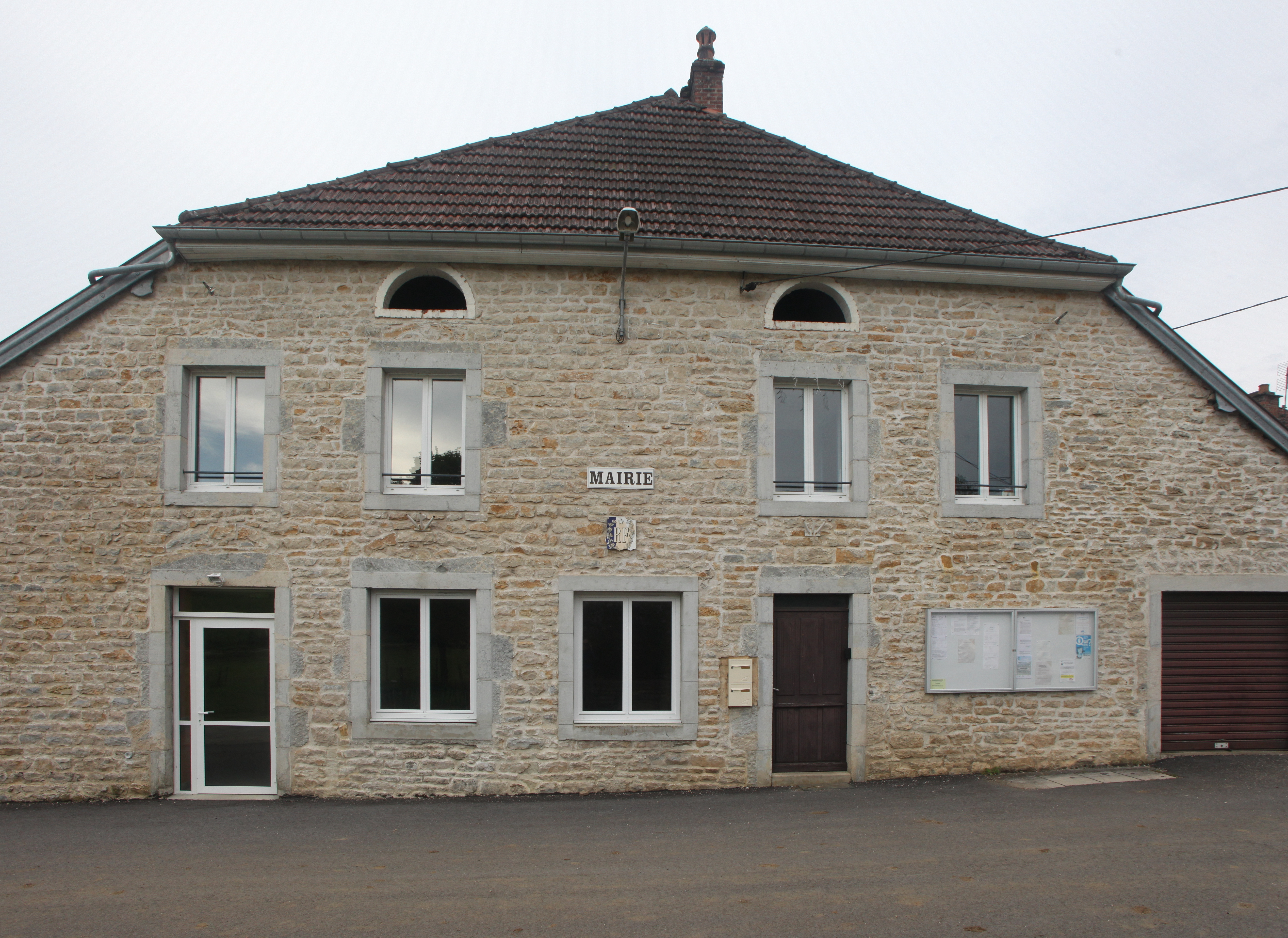 Mairie de Pont-d'Héry (Jura).